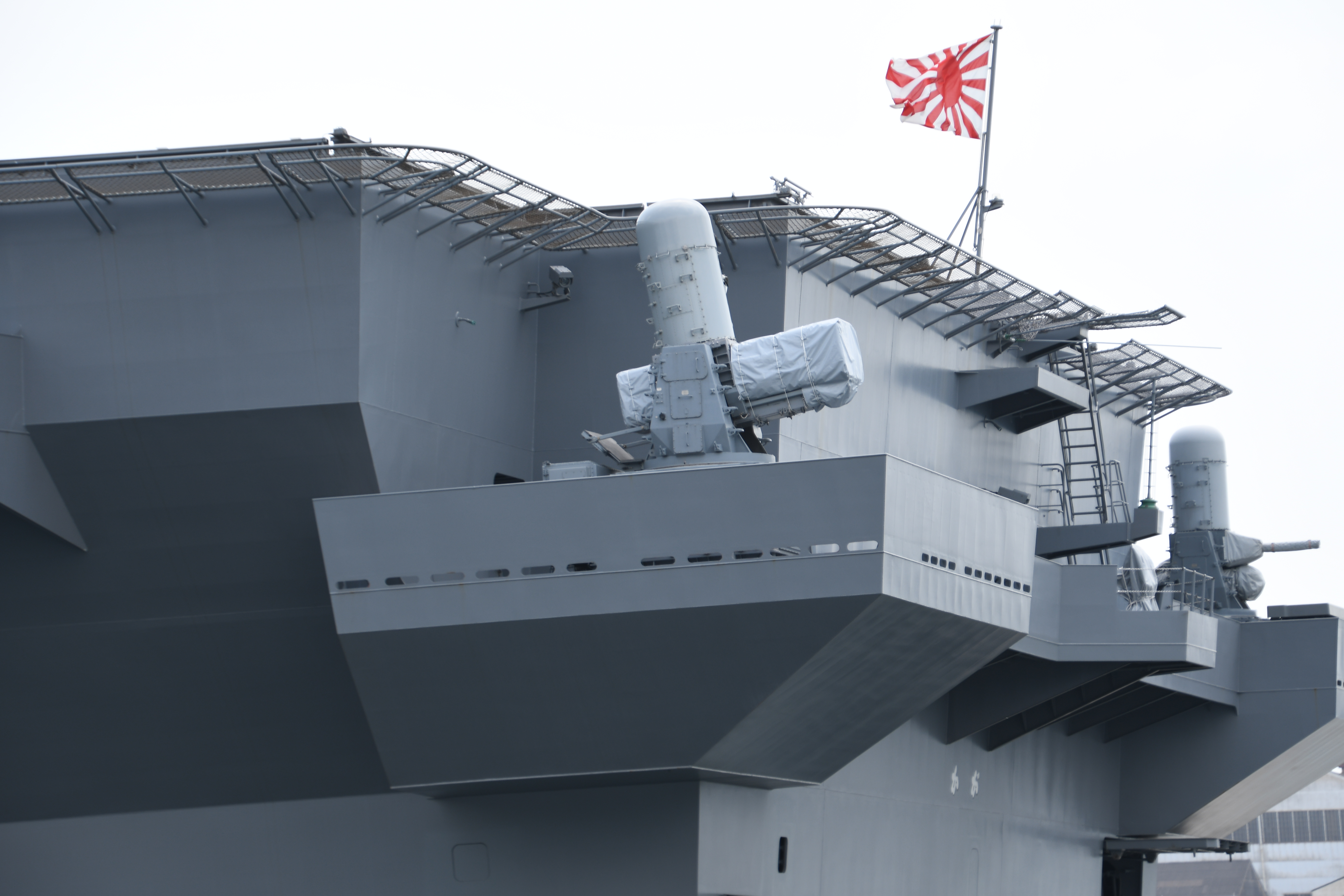 海上自衛隊 ヘリコプター搭載護衛艦かが（DDH-184） 艦尾左舷側のMk.15 Mod.31 SeaRAM 左舷後部。2019年5月6日 呉基地にて。